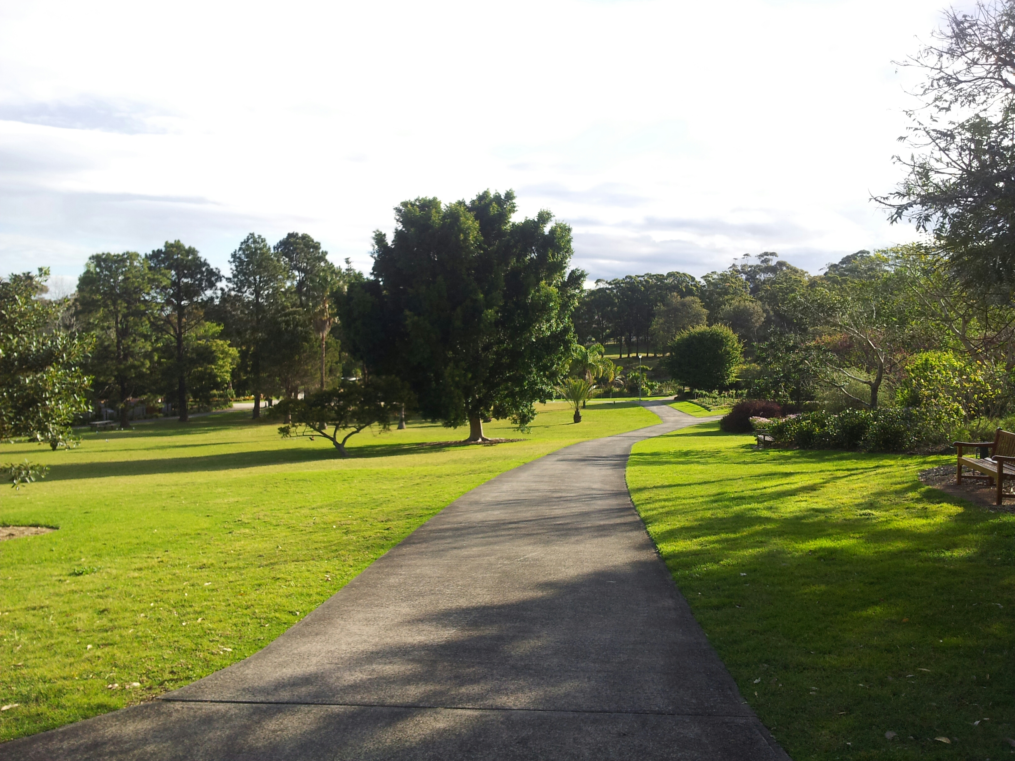 Keiraville NSW 2500, Australia